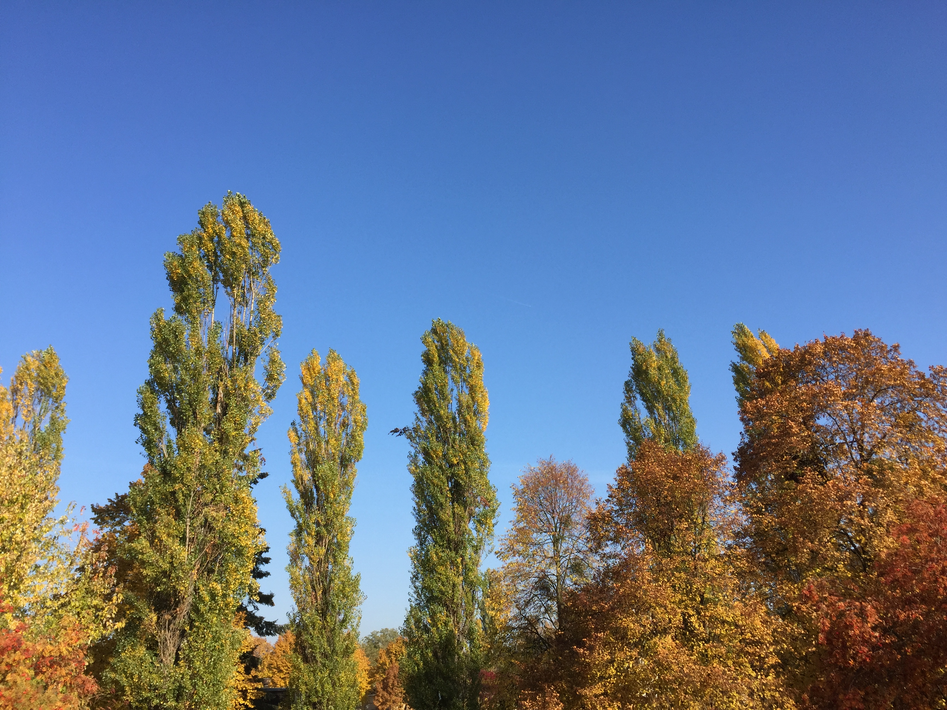 Jesienne drzewa niedaleko ulicy Golęcińskiej w Poznaniu.